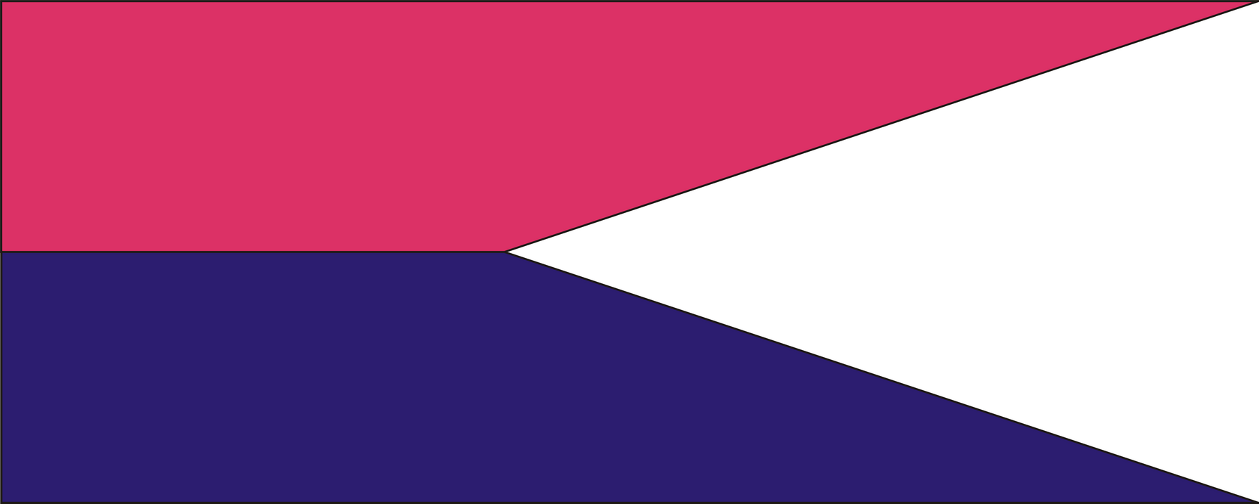 Proporczyk kawalerii (na kołnierz) wprowadzony w Wojsku Polskim w Anglii w 1941